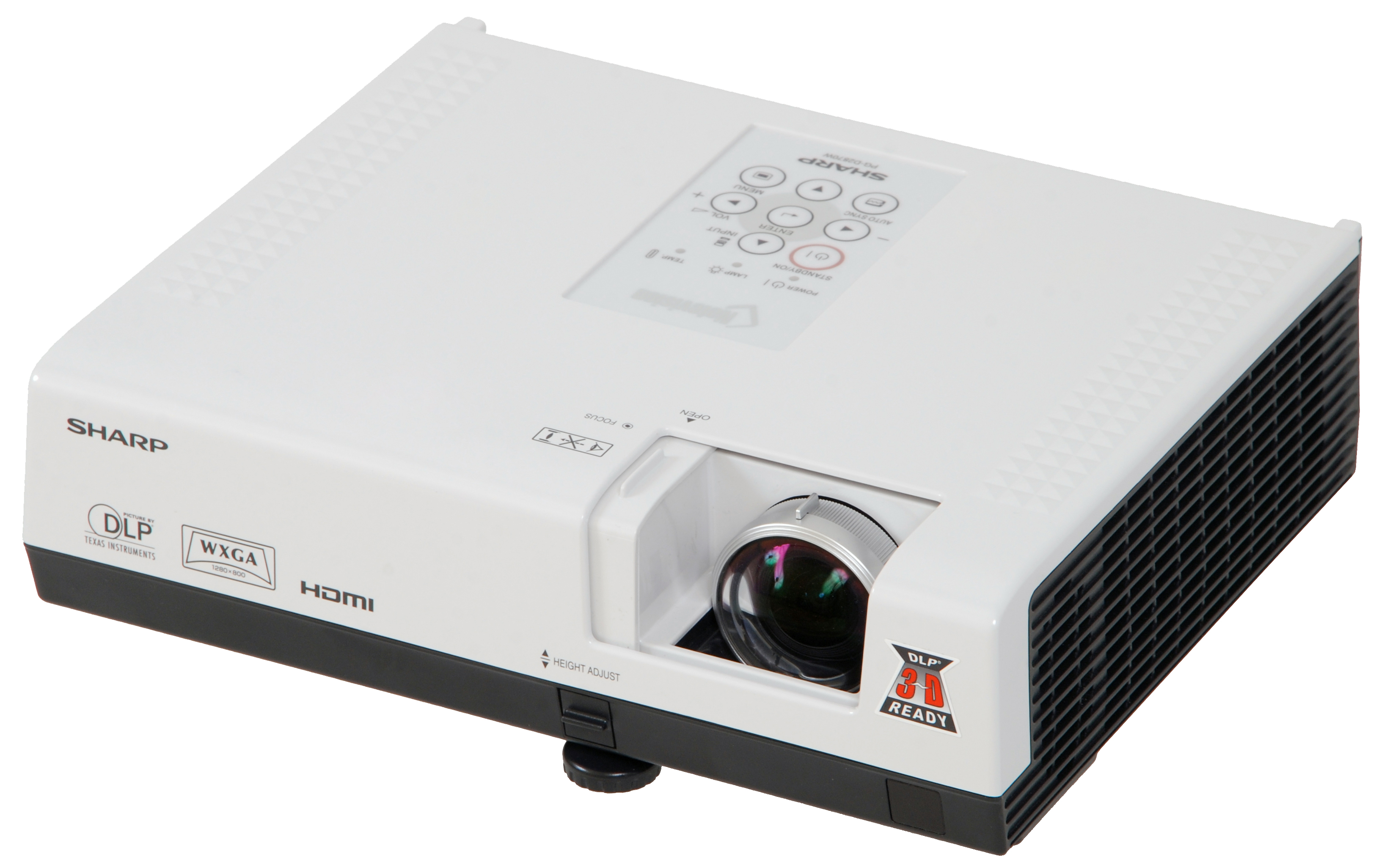 Projektor PGD2870W firmy Sharp